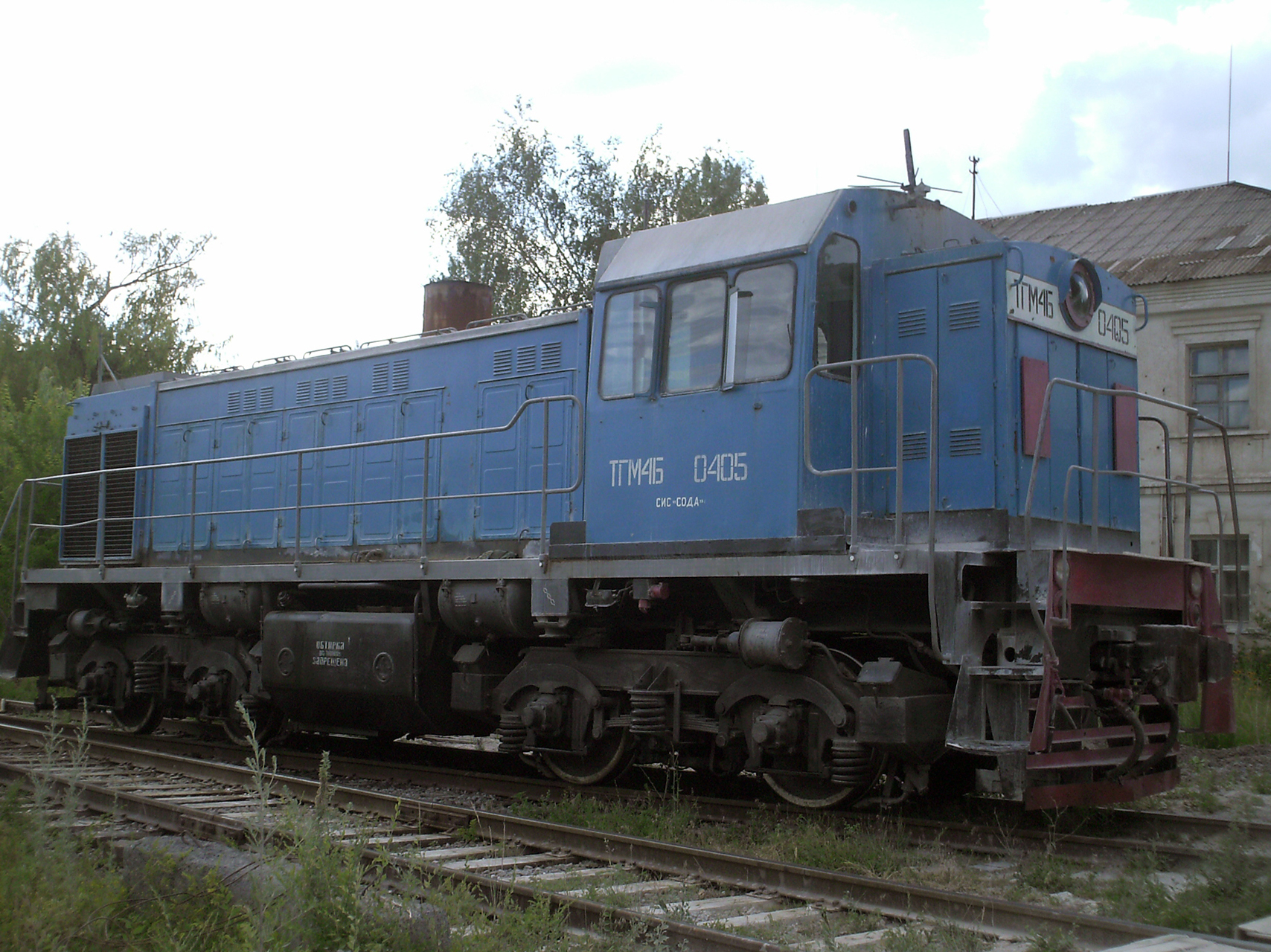 Райгородок Словянського району